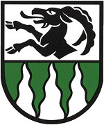 Wappen von Lauterbrunnen